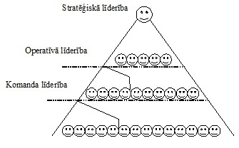 Līderības līmeņi